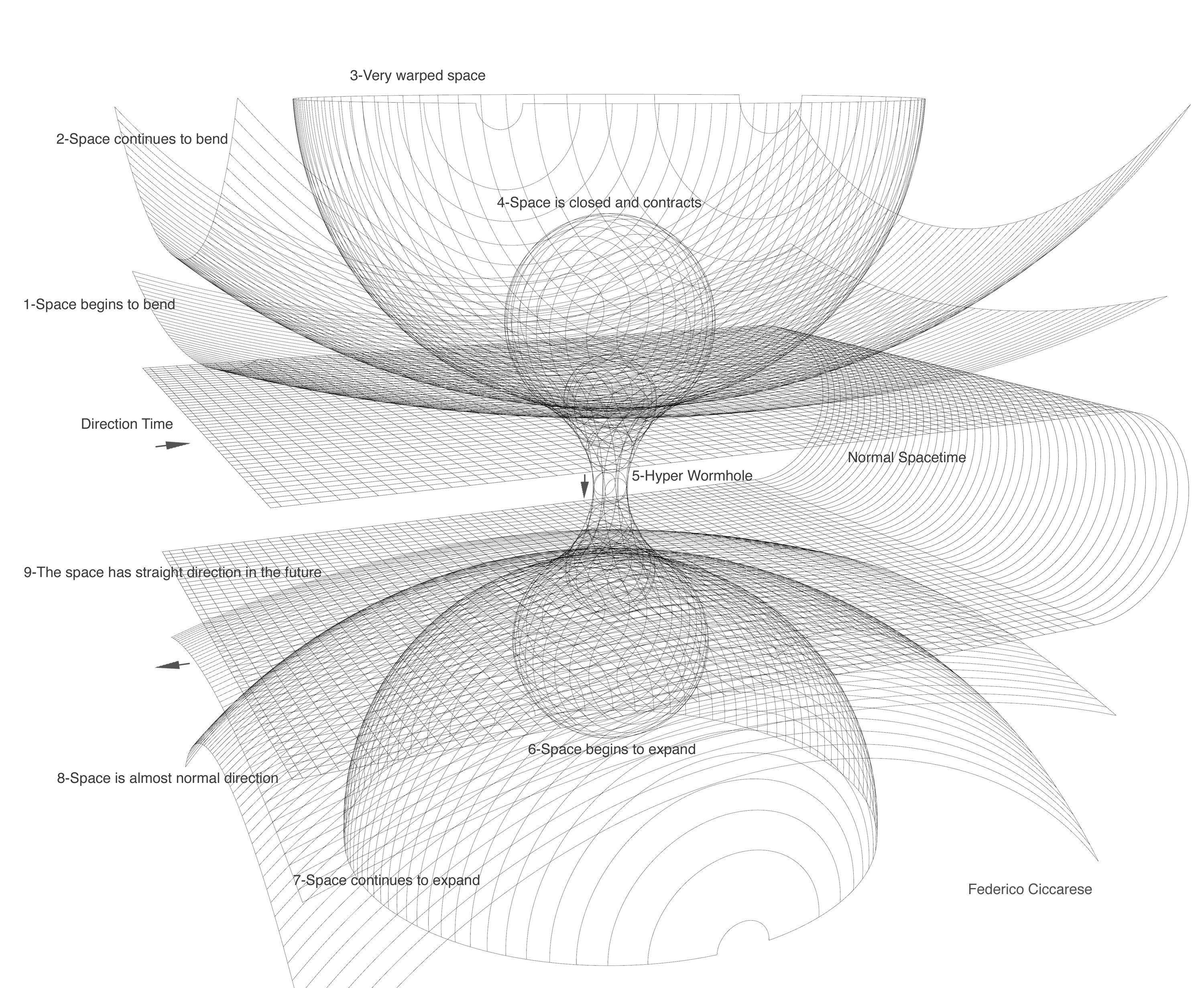 Percorso all'interno di un Hyper Wormhole dove lo spazio si piega fino a chiudersi su se stesso per poi riespandersi e sfociare nel futuro